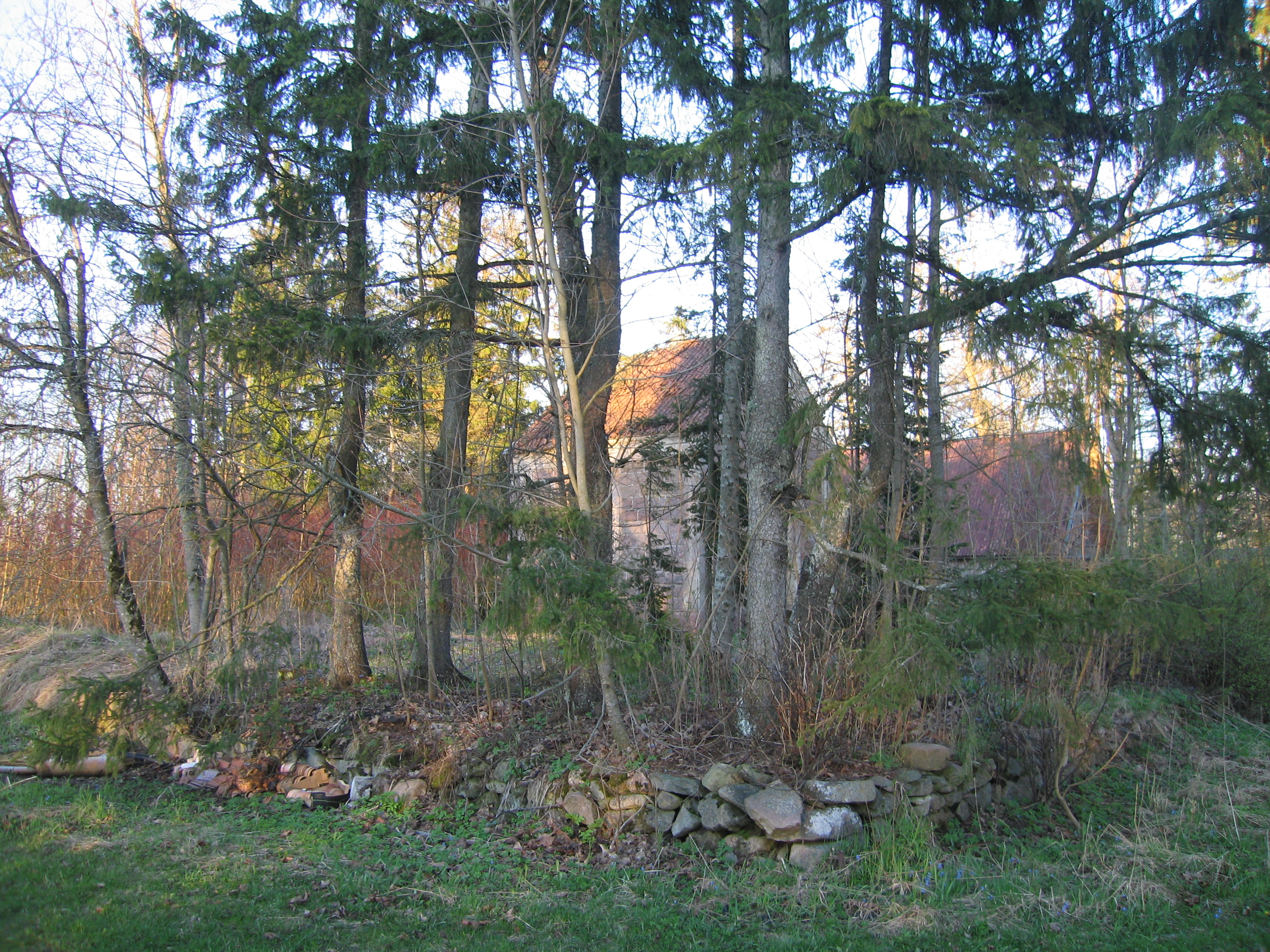 Kalmistu läänevaade, tagaplaanil on kabel. Foto: Robert Treufeldt, 30. aprill 2016